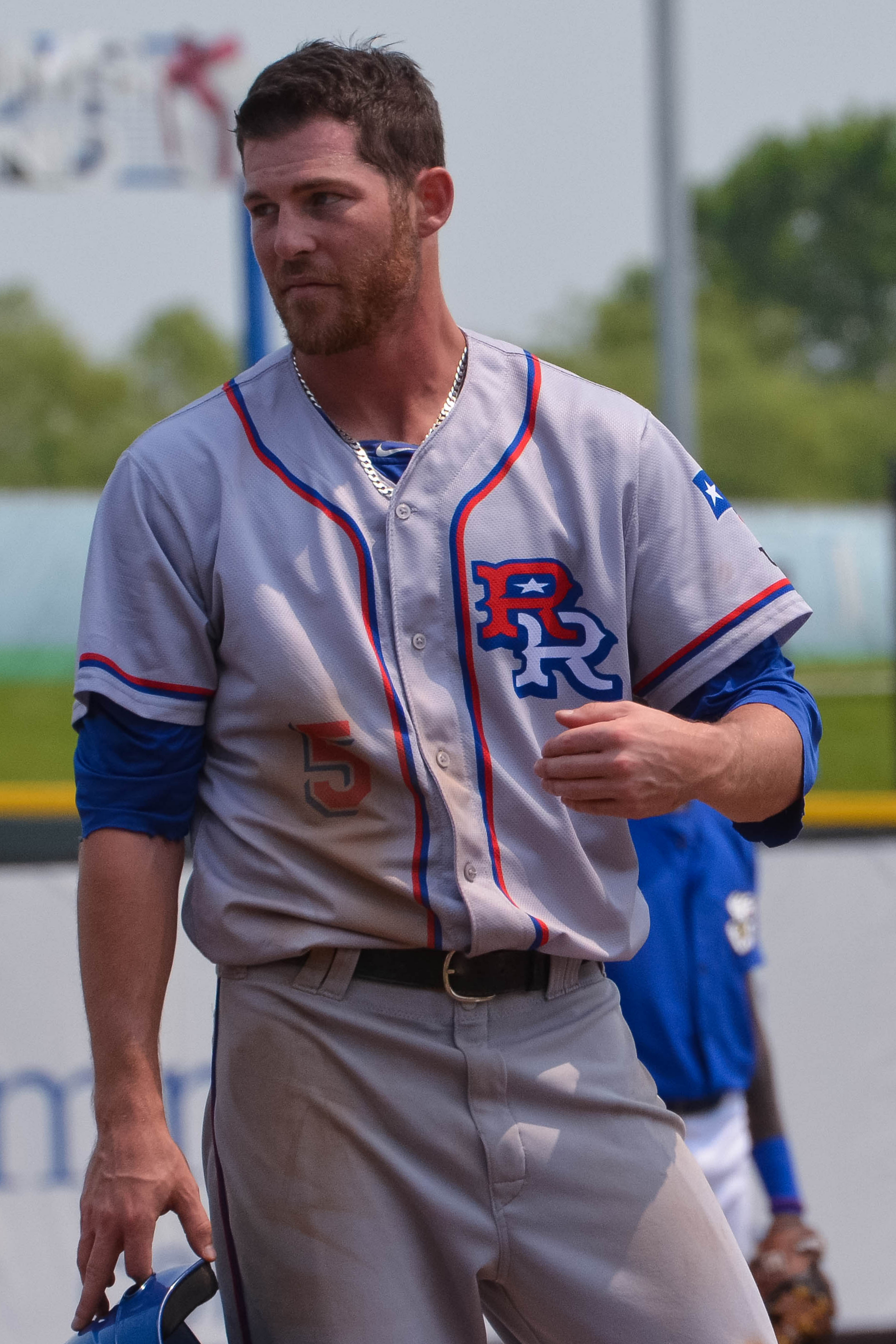 Ryan Strausborger